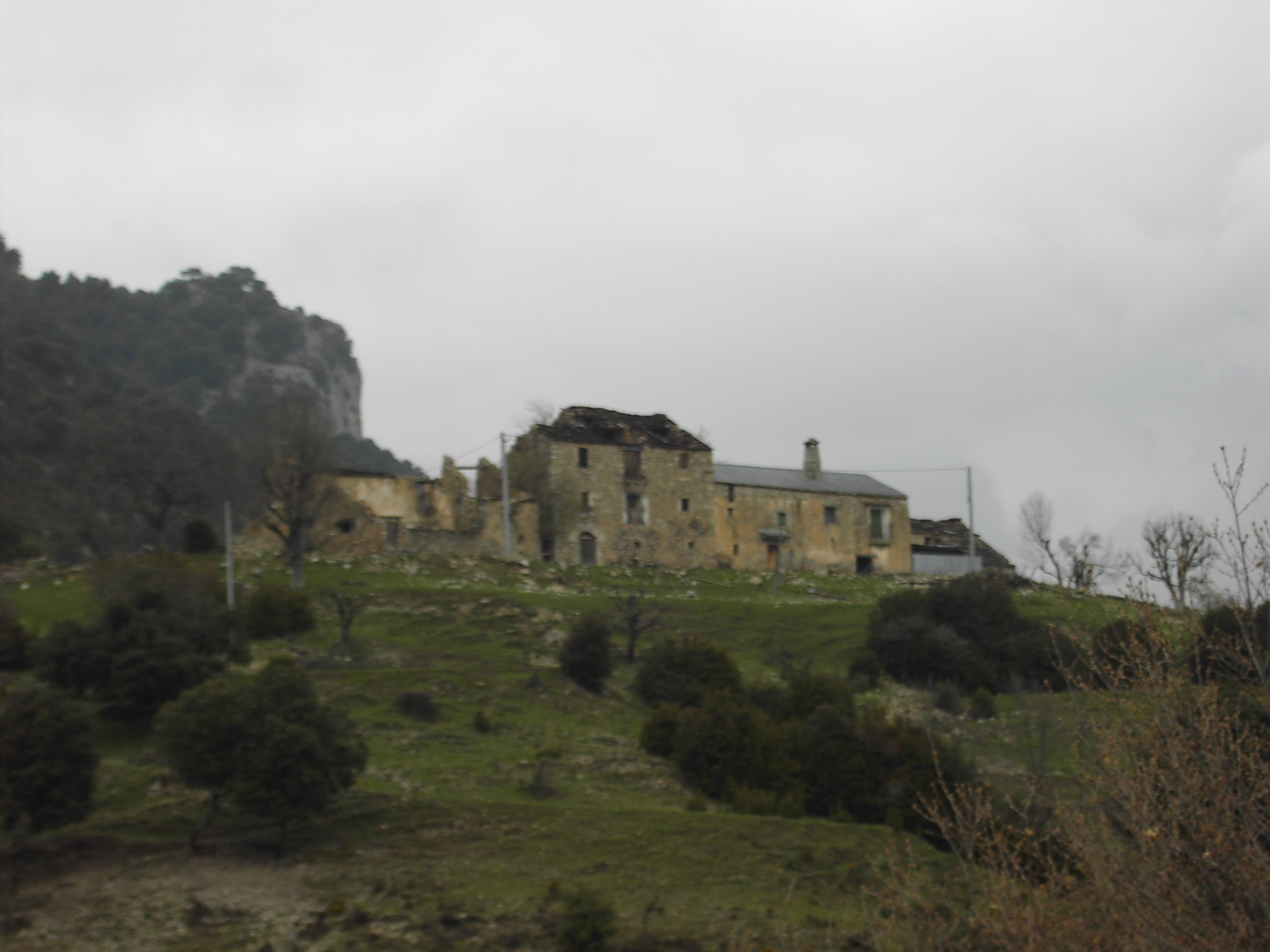 El caserío de Gallisué, perteneciente al municipio oscense de Fanlo.